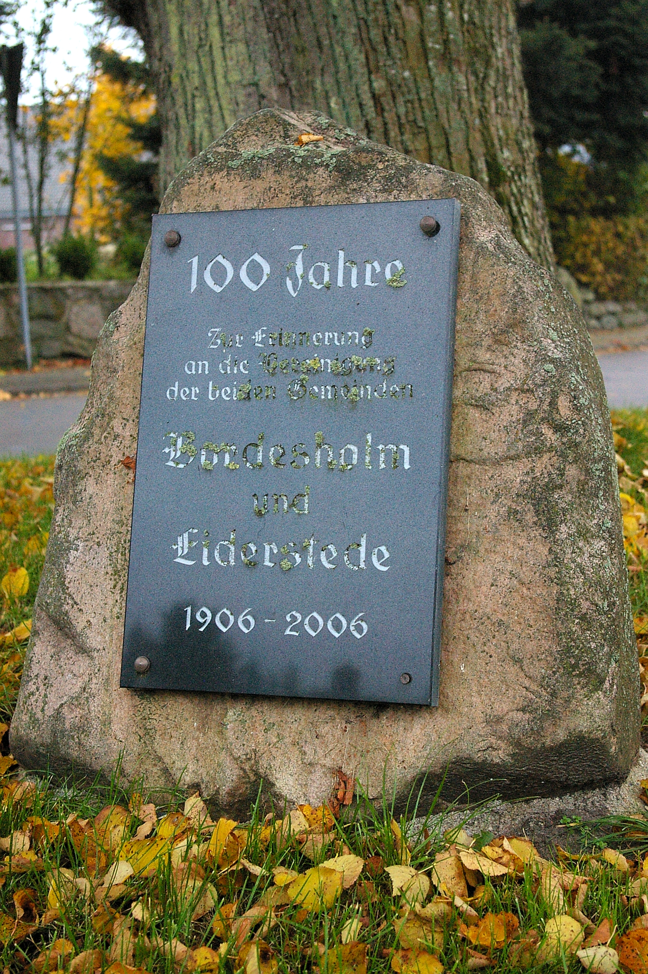 2006 errichteter Gedenkstein, der an den Zusammenschluss von Eiderstede und Bordesholm erinnert